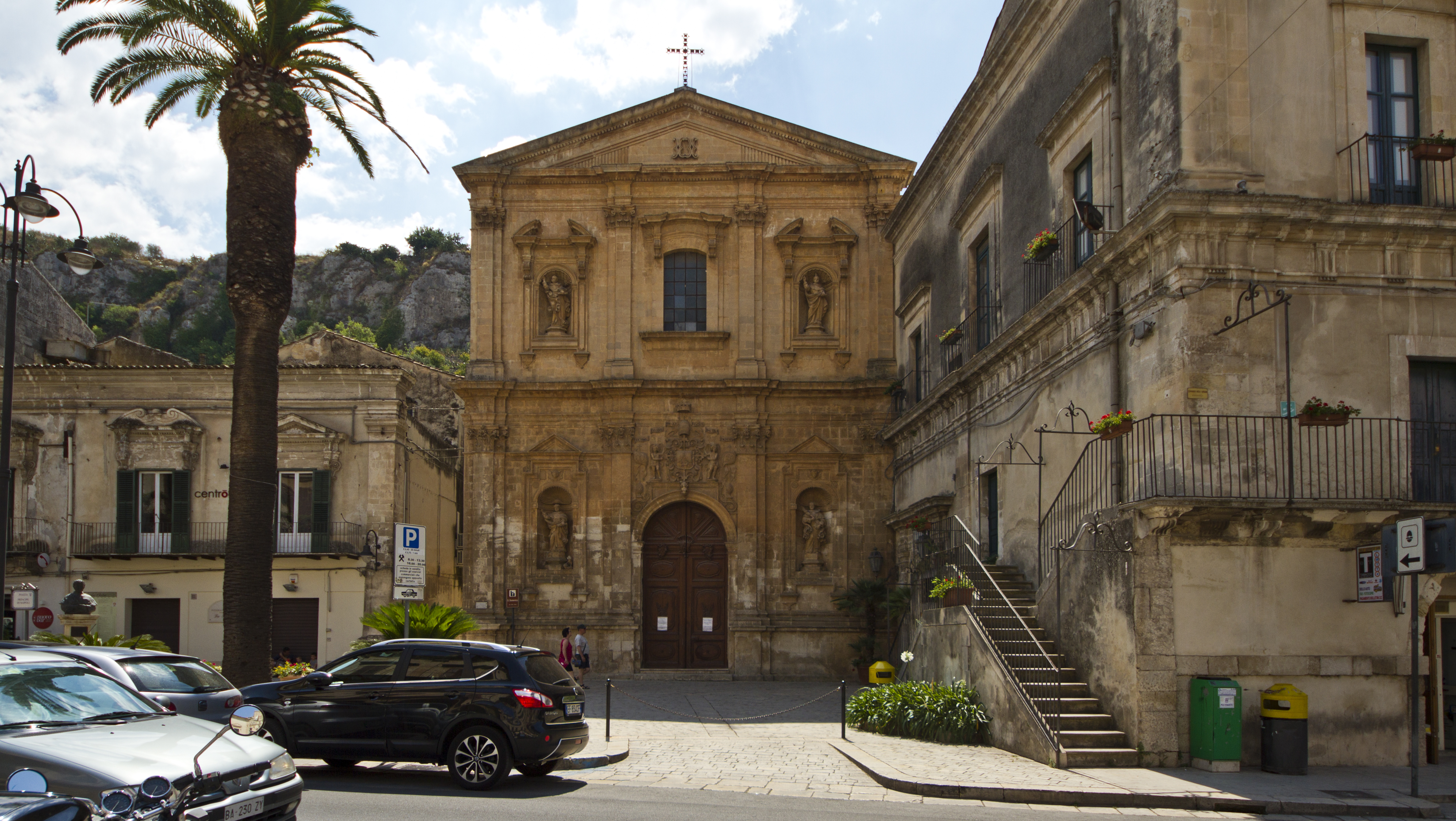 Chiesa di San Dimenico, Modica RG, Sicily, Italy